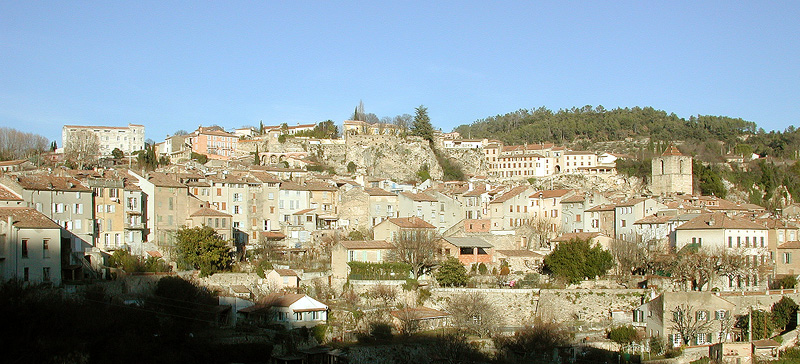 barjols 800 364